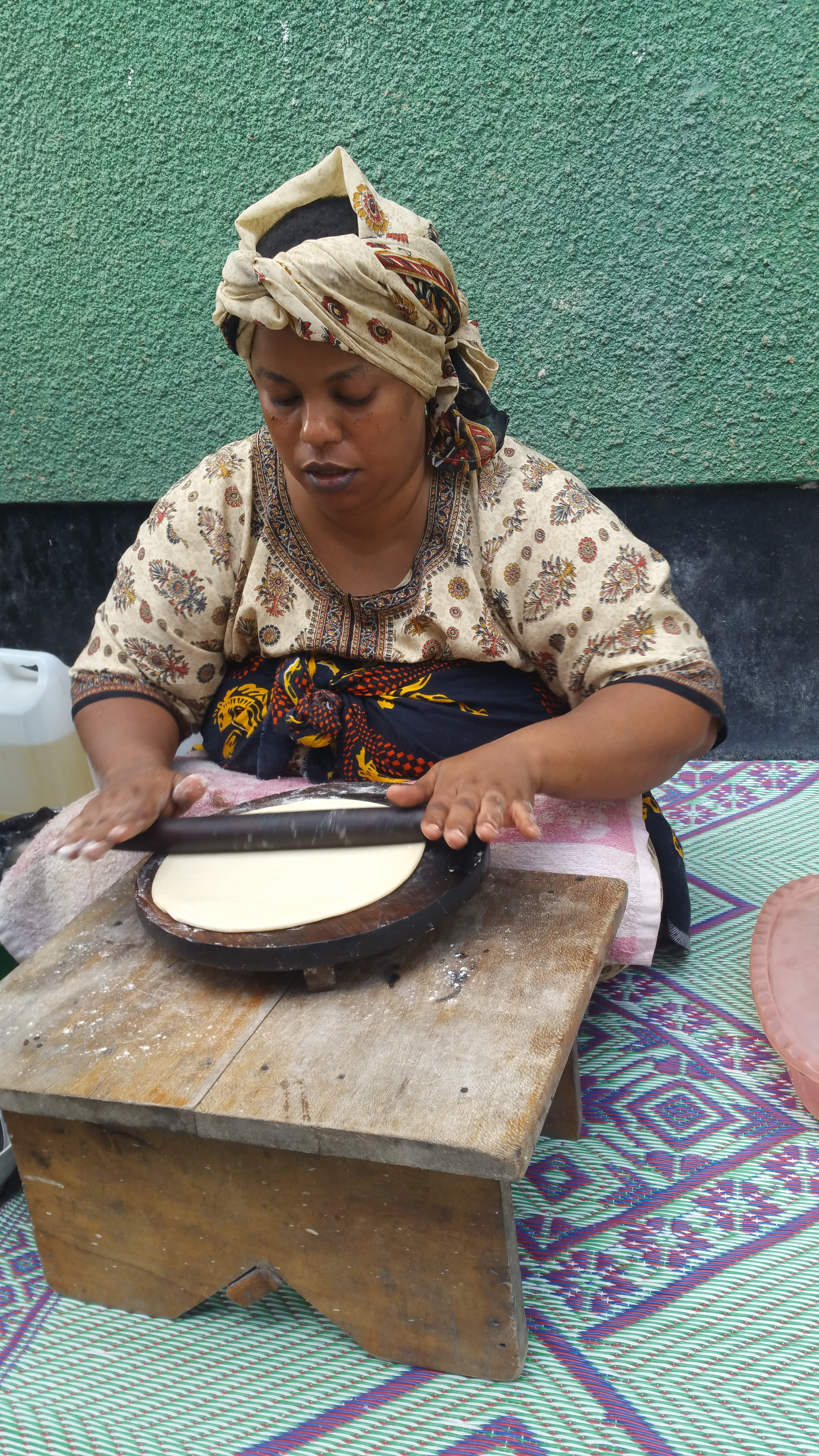 Kiswahili: Mwanamke anasukuma chapati kwa ajili ya vitafunwa vya asubuhi. This is an image of "African people at work" from Tanzania